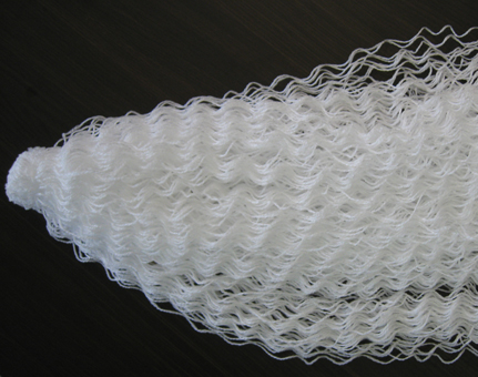 PA-Friezegarn